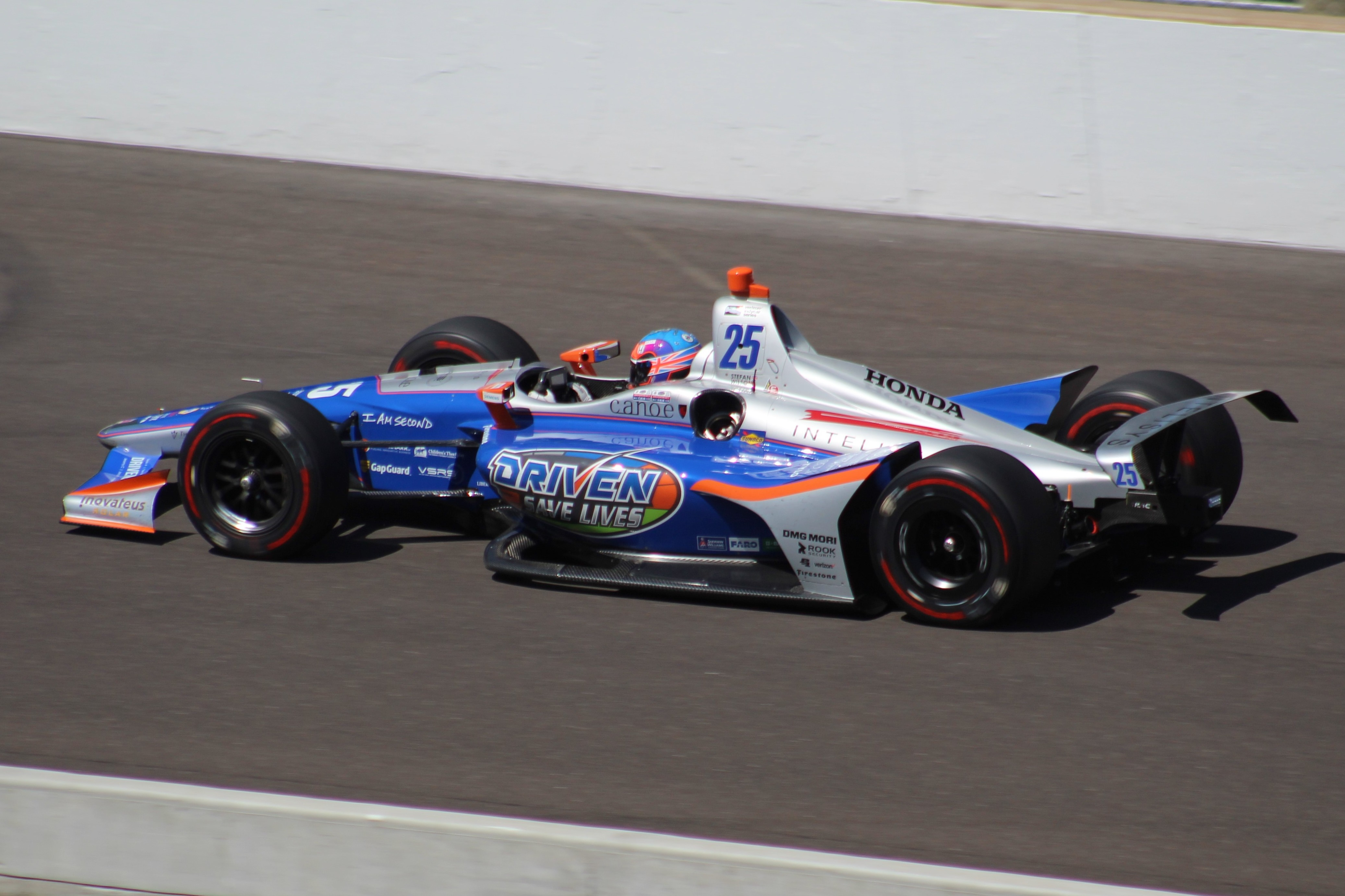 2018 Indianapolis 500